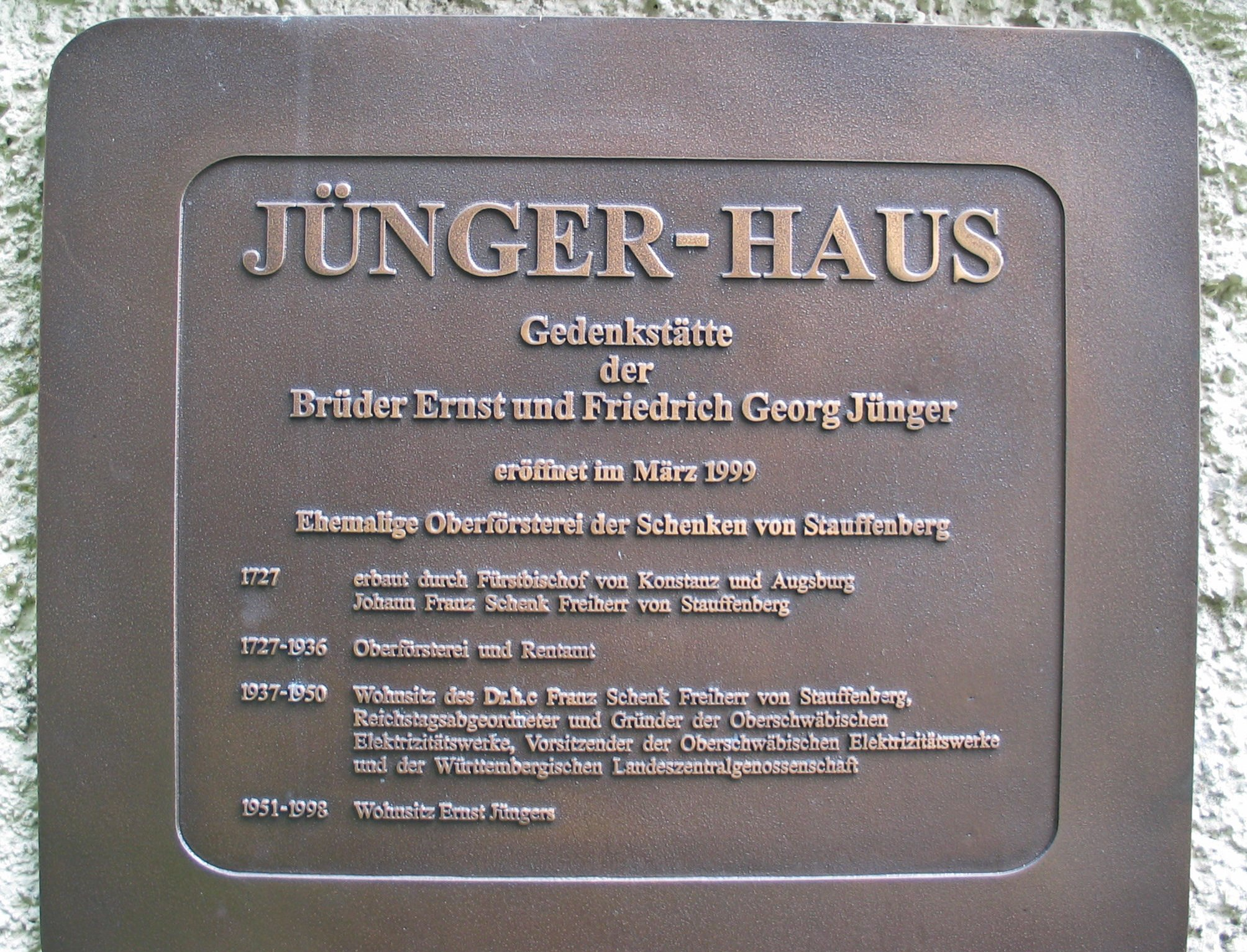 Plaque retraçant l'histoire de la maison habitée par Ernst Jünger à Wilflingen (Allemagne).